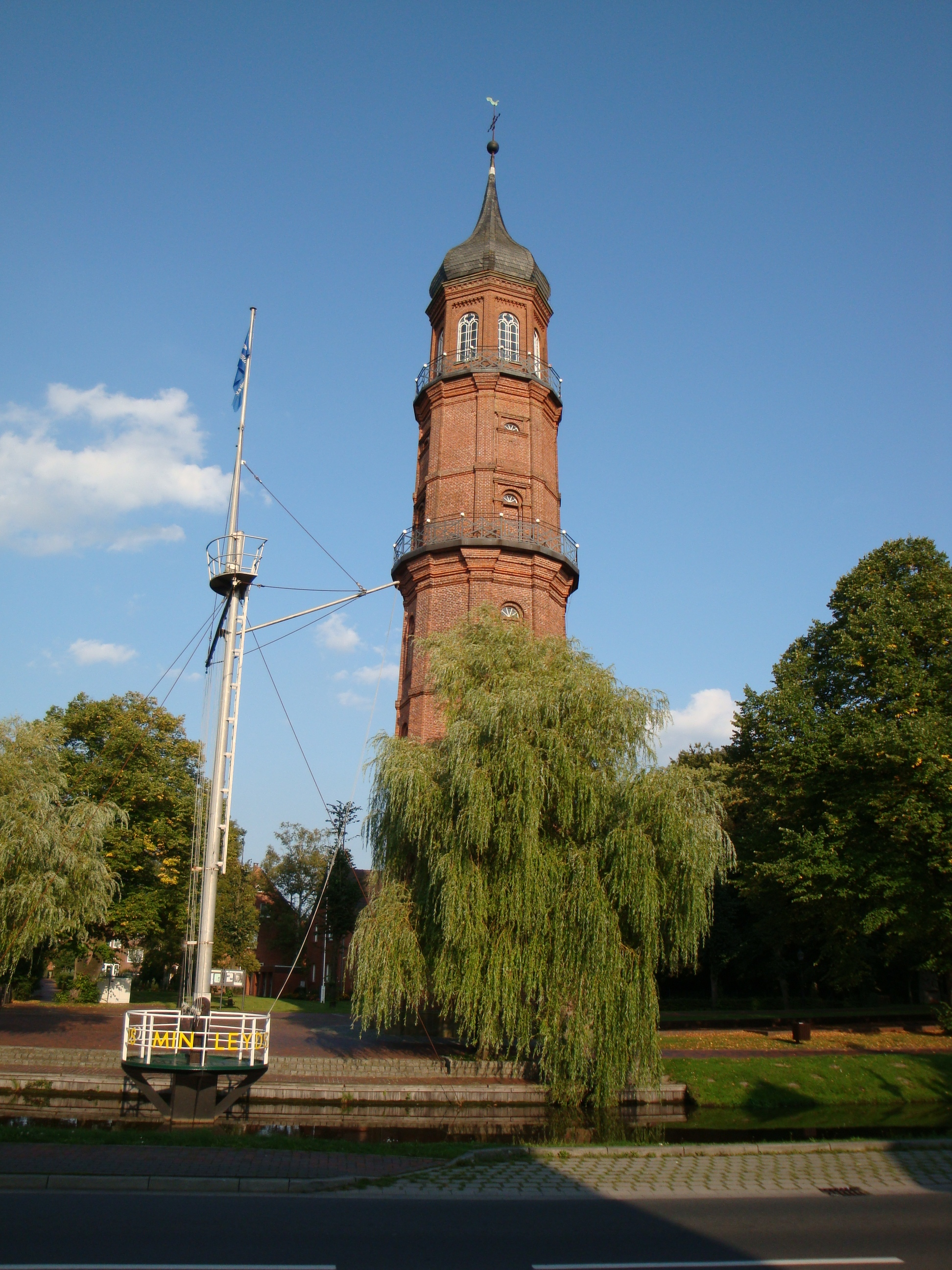 Der "Alte Turm" am Obenende wurde 1848 als Kirchturm erbaut. Der achteckige "Alte Turm" ist ein Nachbau des Leuchtturms von Riga und das Wahrzeichen des Stadtteils Obenende. 130 Stufen geht es den Turm hinauf, ehe Sie den herrlichen Blick über die ganze Stadt genießen können. Der Turm ist gleichzeitig Gedenkstätte der Toten und Vermissten des Ersten und Zweiten Weltkrieges. Entstehungsgeschichte: Im Jahre 1860 lagen einmal 64 Papenburger Segler im Hafen von Riga. Den Kapitänen gefiel der achteckige Leuchtturm der einstigen Hansestadt so gut, dass sie ihn daheim in Papenburg exakt nachbauen ließen. Adresse: Umländerwiek rechts 1, 26871 Papenburg.